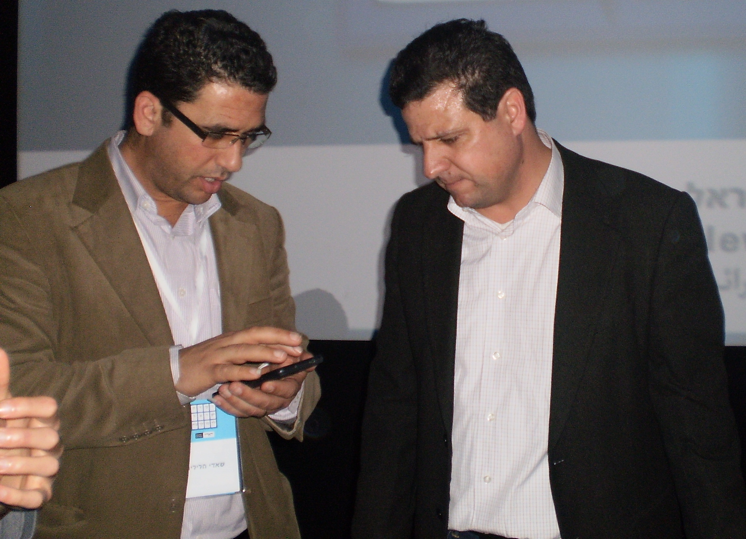 Ayman Odeh (right) and Shady Halilya איימן עודה (מימין) ושאדי חליליה